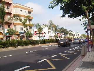 La Cuesta